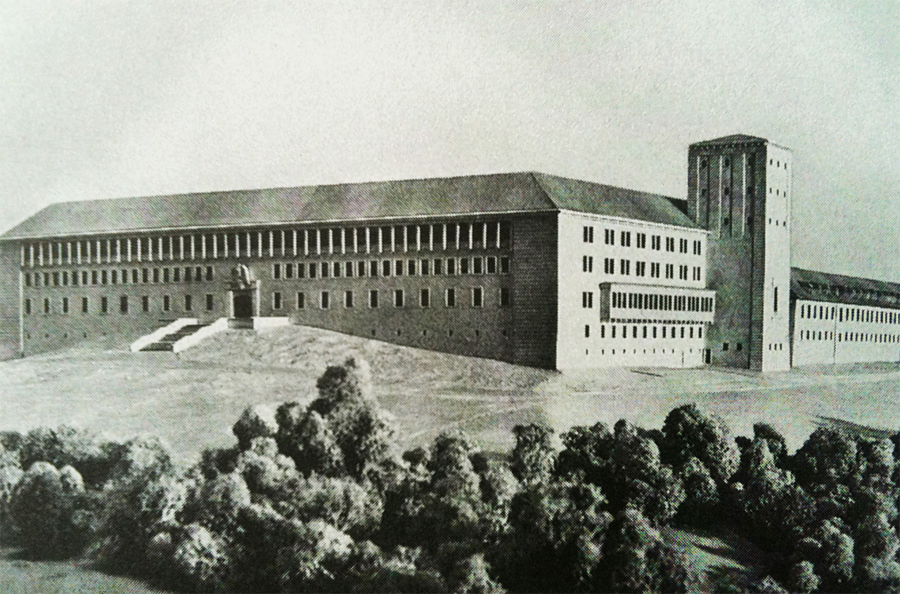 "Adolf-Hitler-Schule"; exponierte Lage auf dem Westhang des Hesselbergs, Entwurf von Baurat Julius Schulte-Frohlinde, Berlin (Bauabteilung der Deutschen Arbeitsfront); Neubauplanung 1937-45. Zur Errichtung der "Adolf-Hitler-Schule für den Gau Franken" sollte die Bewaldung des Hesselbergs auf einer Fläche von 90 x 200 m abgeholzt und "hässliche Bauwunden am Berg" ( wie Steinbrüche, u. ä.) beseitigt werden. Der Entwurf sah eine monumentale Anlage (für ca. 360 Schüler) in fränkischem Muschelkalk mit viereckigem Haupttrakt, Eckturm am südlichen Ende und Flügelbauten vor. Im dreigeschossigen Mittelteil sollten Klassenzimmer, Gesellschaftsräume, Krankenabteilung u. a., in den zweigeschossigen Anbauten Schlaf- und Wohnräume in mehreren Abteilungen für je 60 Schüler eingerichtet werden. Für körperliche Ertüchtigung und wehrsportliche Übungen waren Sportplätze, Turnhallen und eine Badehalle bei Gerolfingen (an der Wörnitz) vorgesehen. Im Rahmen des Schulunterrichts sollte besonders der Segelflug gefördert und damit eine künftige Kampffliegertruppe erzogen werden. Ein, im Schulgebäude integriertes Museum mit archäologischen Funden auf dem Baugelände sollte die vermeintliche Kontinuität germanischer Siedlungstätigkeit auf dem Hesselberg unterstreichen. Zeitgleich sollte am Südhang des Berges eine Lehrer- und Angestelltensiedlung angelegt werden. Das Modell der geplanten Schule wurde auf der Architekturausstellung 1938 in München gezeigt. Im Vorfeld des Baus wurden Straße, eine Wasserversorgungsanlage und ein Barackenlager (mit Verwaltungsgebäude und Garagenbauten für die Ingenieure) errichtet. Die Grundsteinlegung für die Schule erfolgte am 15. Januar 1938 durch Julis Streicher in Anwesenheit von Polit- und Militärprominenz. Der Baubeginn war für April 1938 vorgesehen. Die Bauzeit wurde auf 1 1/2 Jahr, die Baukosten auf ca. 5Mio. RM geschätzt. Ausgeführt wurde jedoch der Bau der Schule nicht.